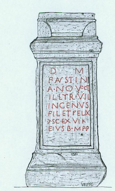 Weihealtar des Zöllners Faustinus, Passau (D), Severinskirche.